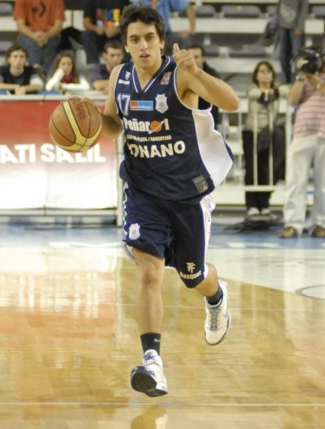 El jugador de Peñarol Facundo Campazzo en un partido de local.